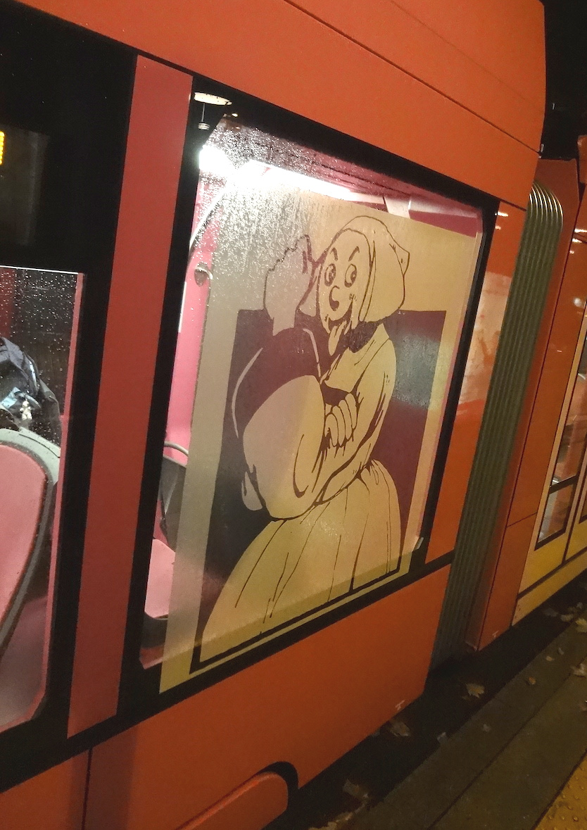 Exposition du collectif Les Indociles, sur le tram Monochrome Rose de Pipiloti Rist. Extérieur : caricature de la Mère Royaume.